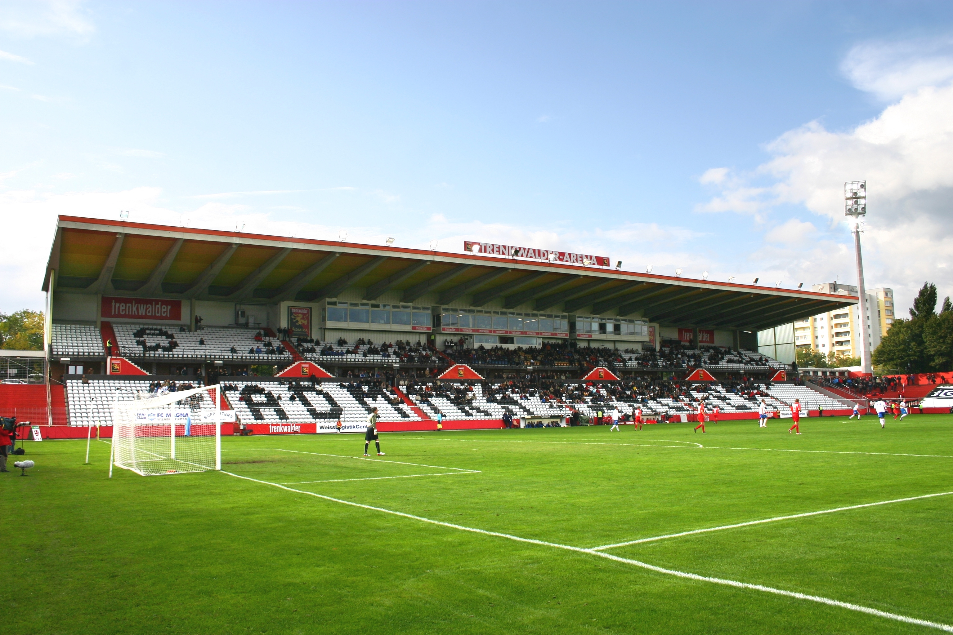 Trenkwalder Arena (vormals Bundesstadion Südstadt)